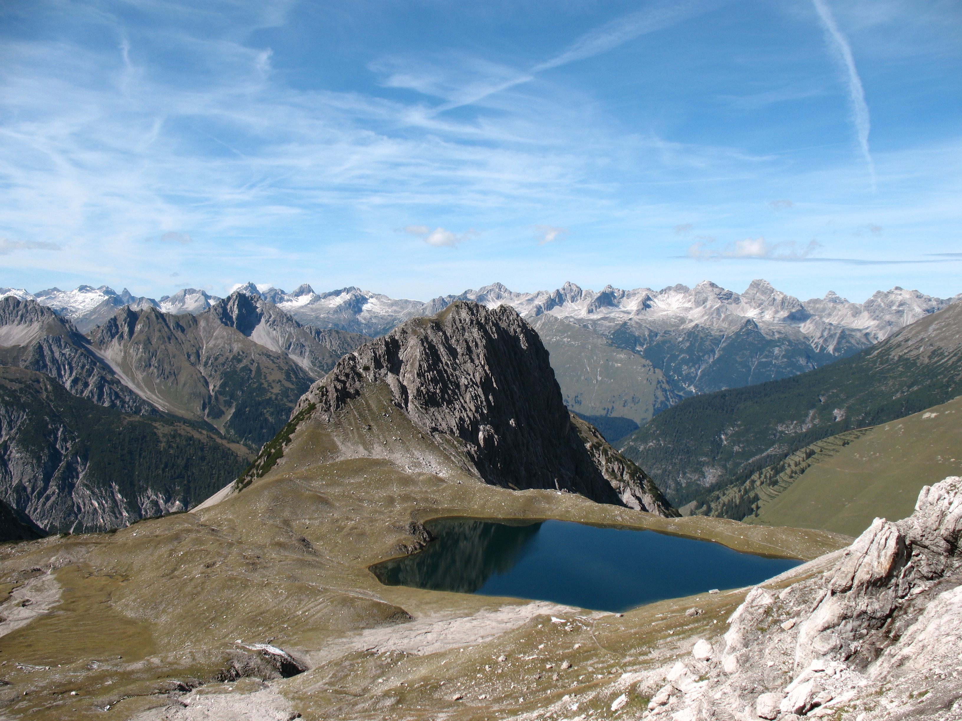 Kogelsee (2171 m) mit Kogel (2318 m) in den Lechtaler Alpen aus Süden gesehen. Dahinter der Allgäuer Hauptkamm und die Hornbachkette.